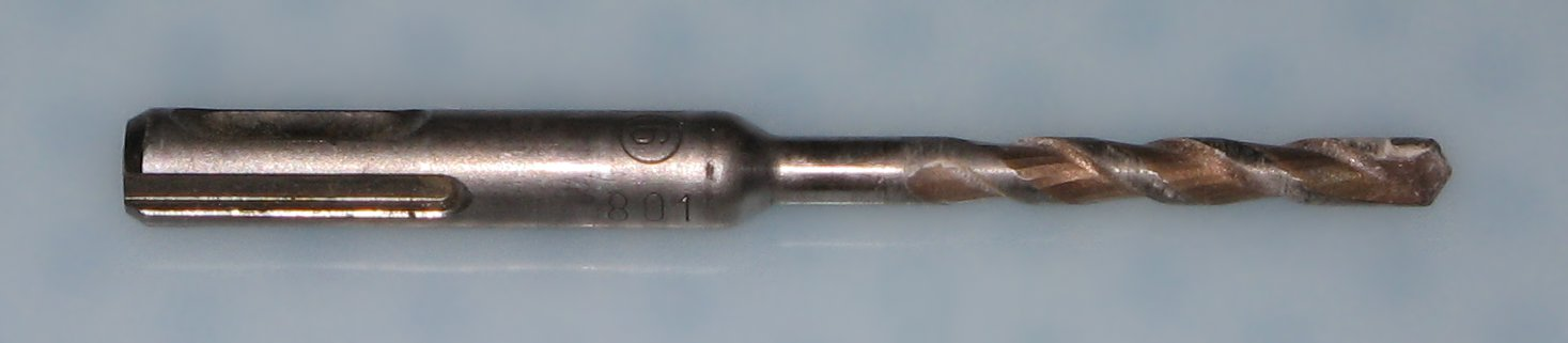 Trepano por betono La foto estis farita de mi mem.